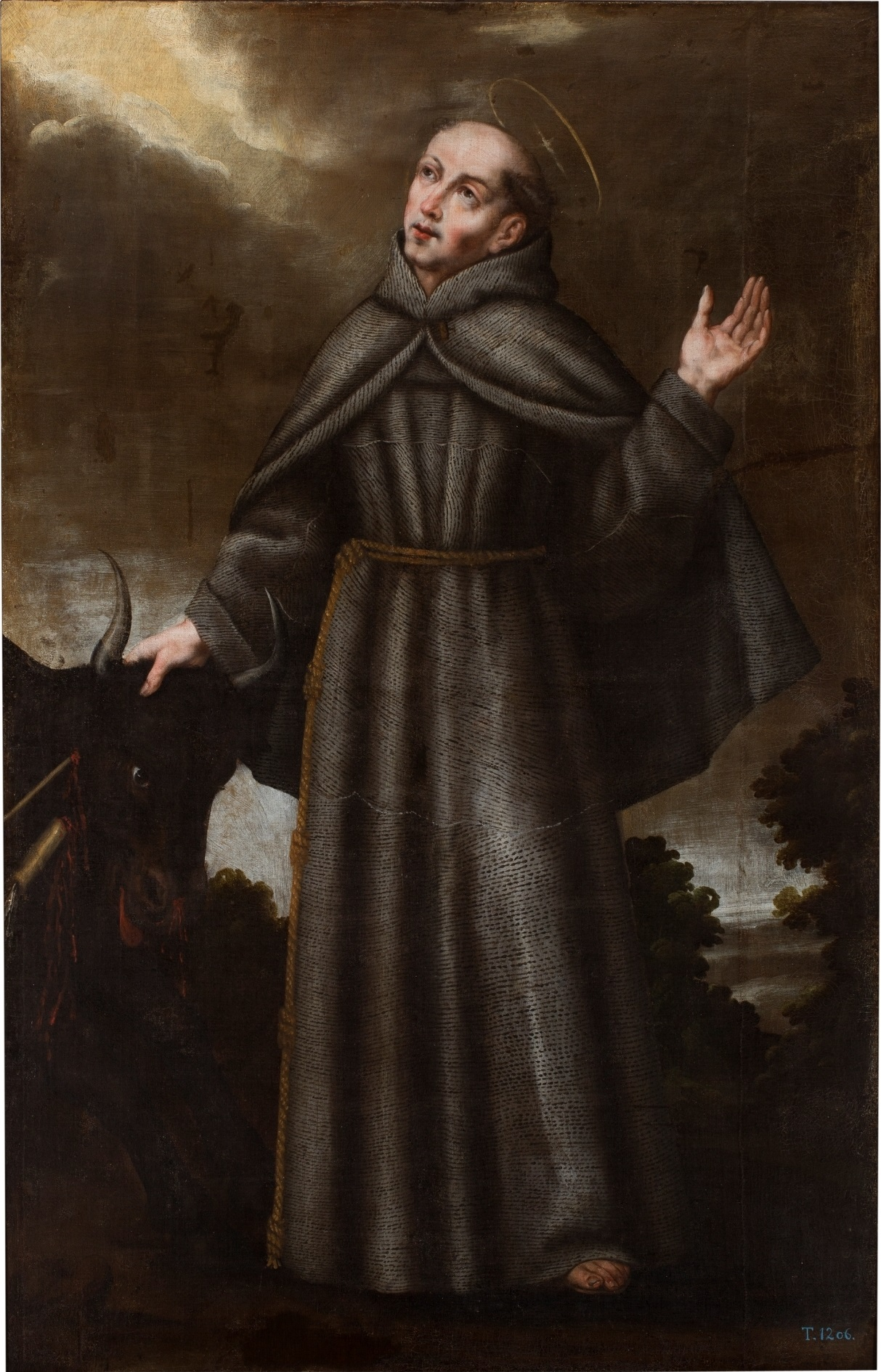 La obra representa al religioso franciscano español San Pedro Regalado (1390-1456).